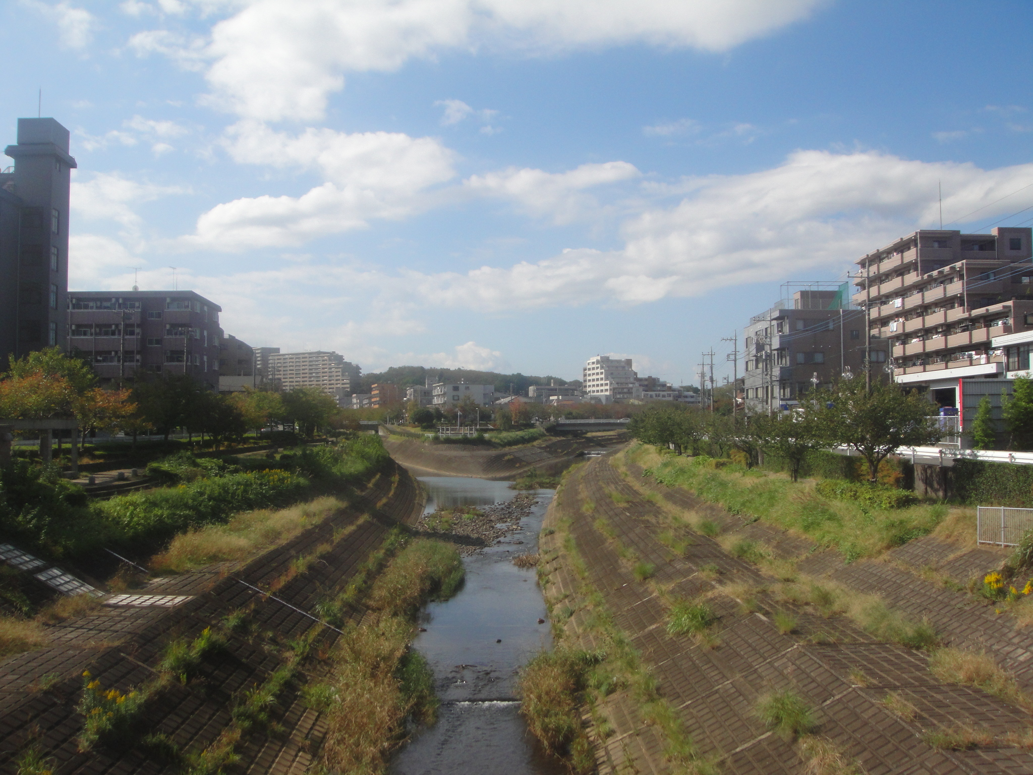 タイトルに同じ